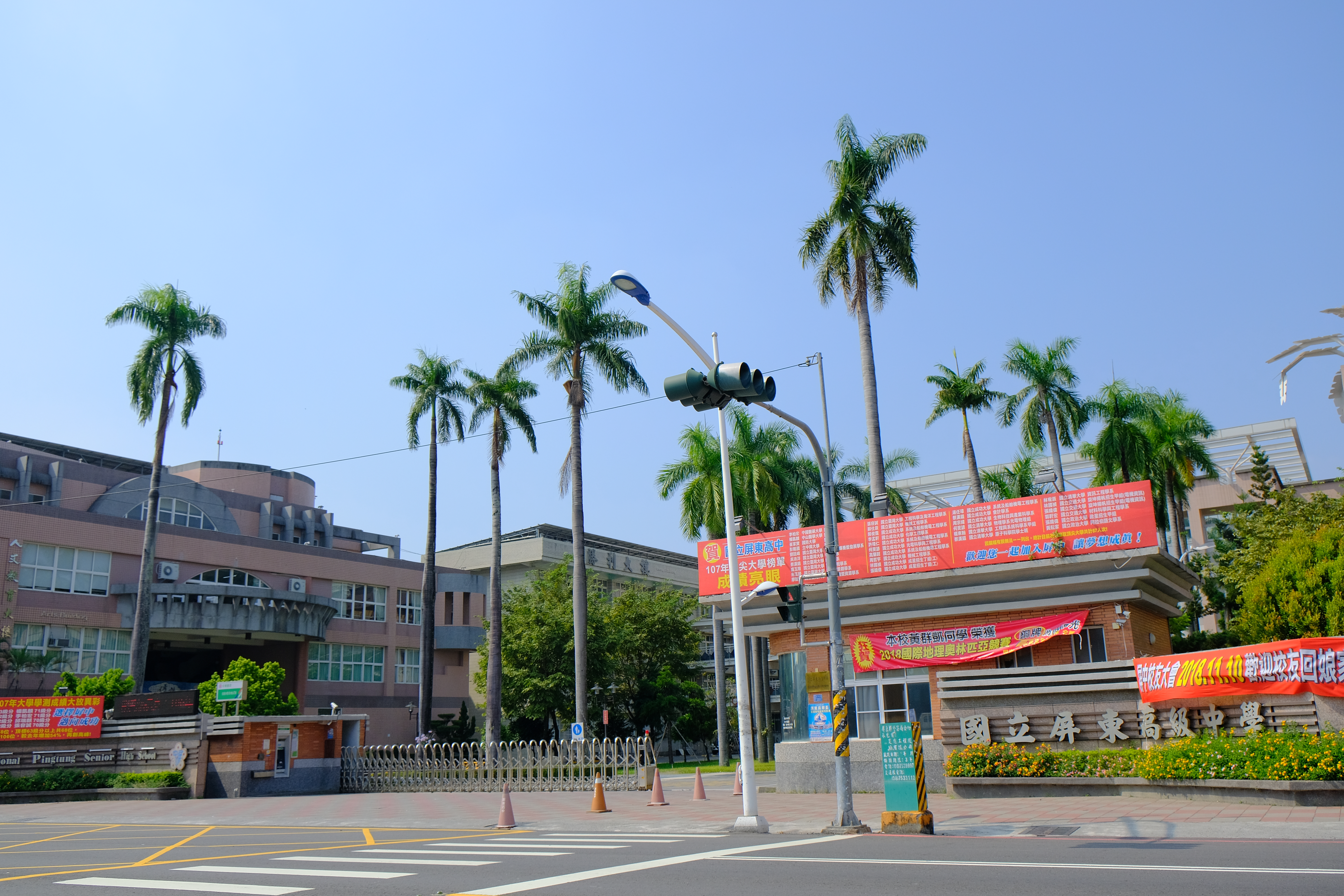 2018National Pingtung Senior High School Gate 國立屏東高級中學大門